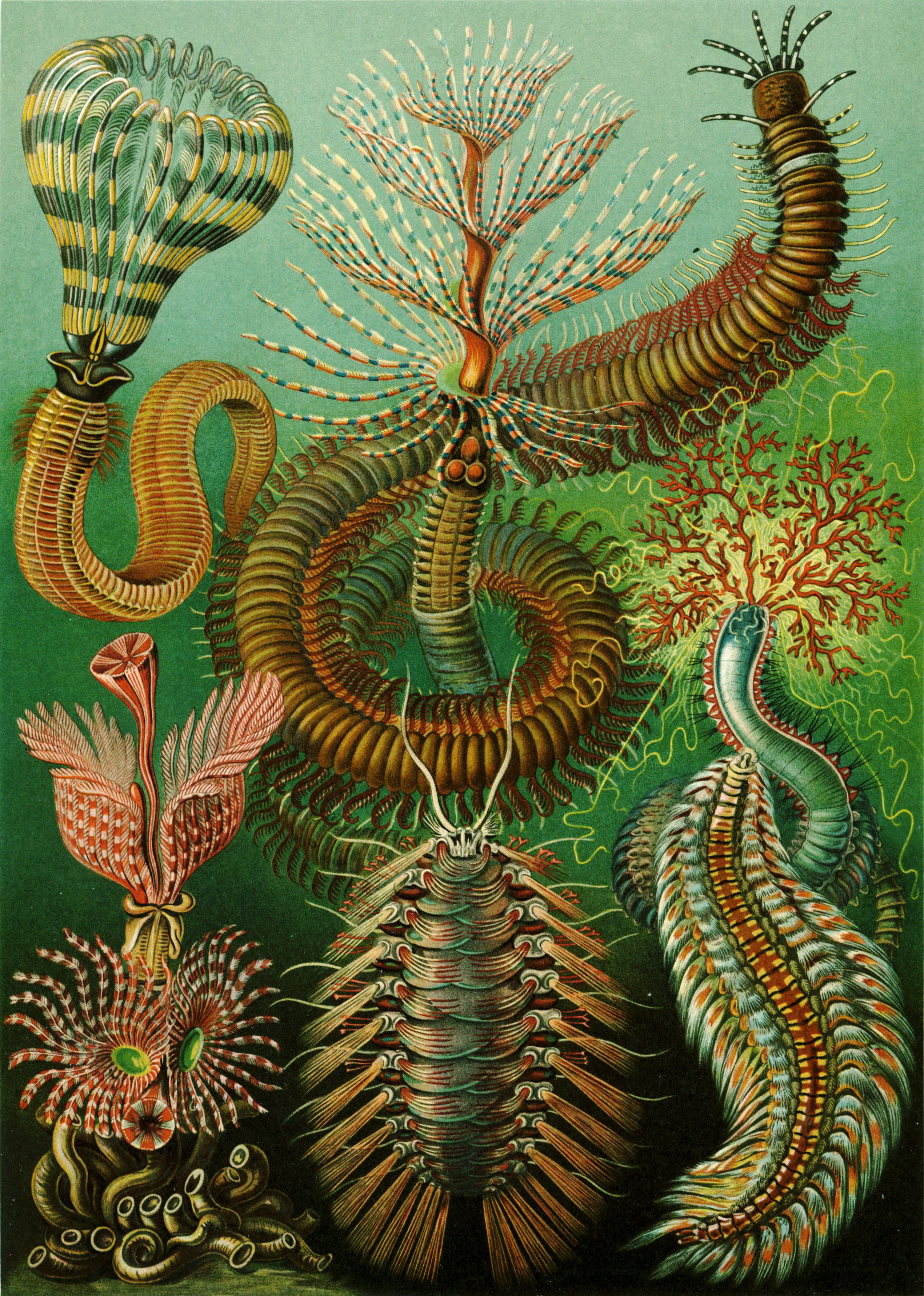 See here for index to numbers. Sabella spectabilis (Grube) (=Sabellastarte spectabilis (Grube, 1878)) Serpula contortuplicata (Linné) (=Hydroides norvegicus Gunnerus, 1768) Spirographis spallanzanii (Viviani) (=Sabella spallanzanii (Gmelin, 1791)) Terebella emmalina (Quatrefages) (=Pista cretacea (Grube, 1860)) Eunice magnifica (Quatrefages) (=Eunice magnifica Grube, 1866) Hermione hystricella (Quatrefages) (=Hermione hystricella Milne-Edwards in Cuvier, 1836) Cloëia euglochis (Ehlers) (=Chloeia viridis Schmarda, 1861)